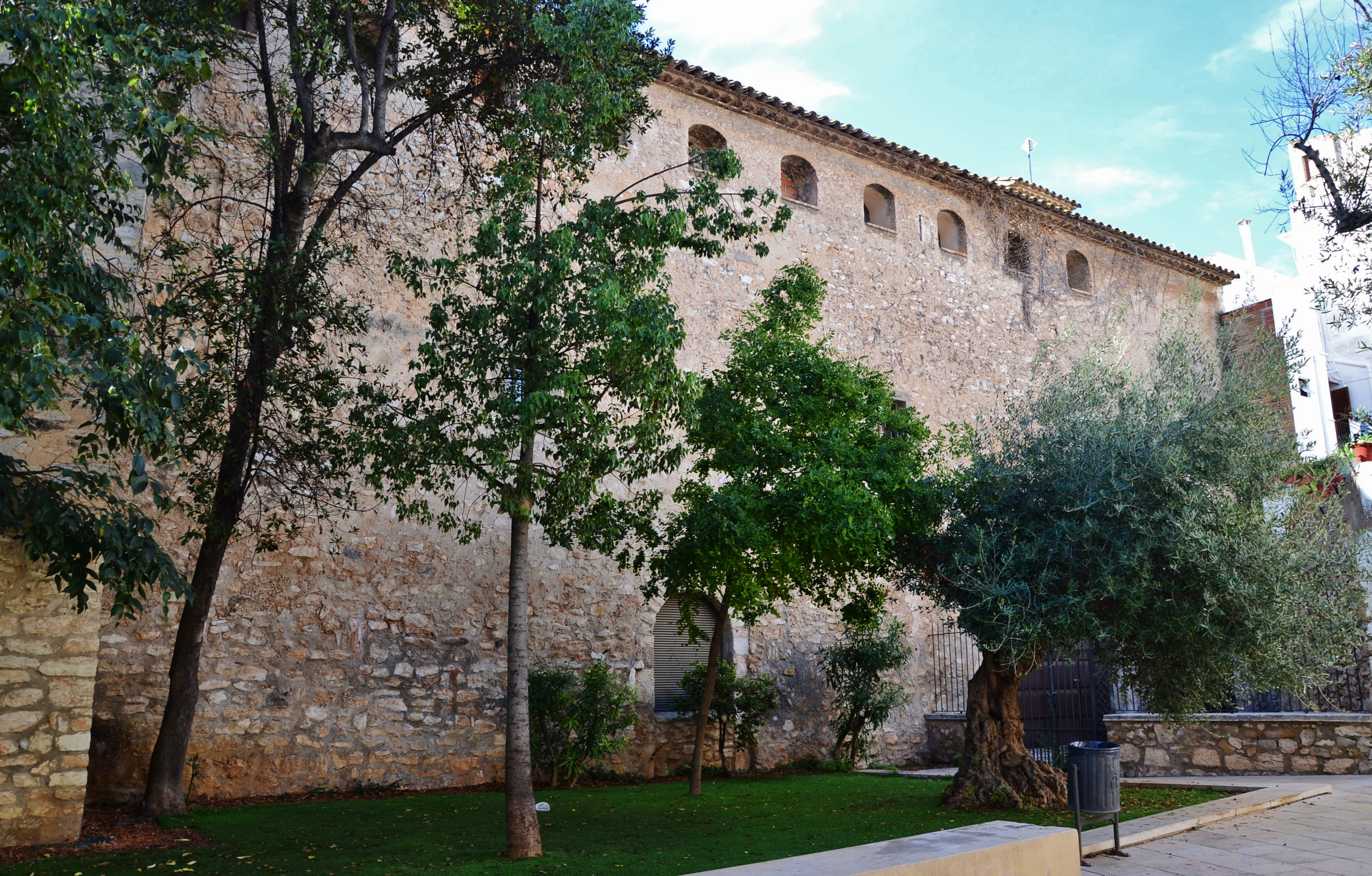 Castell de la Geltrú (Vilanova i la Geltrú)